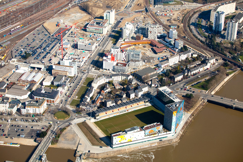 Vue aérienne sur le quartier Euronantes